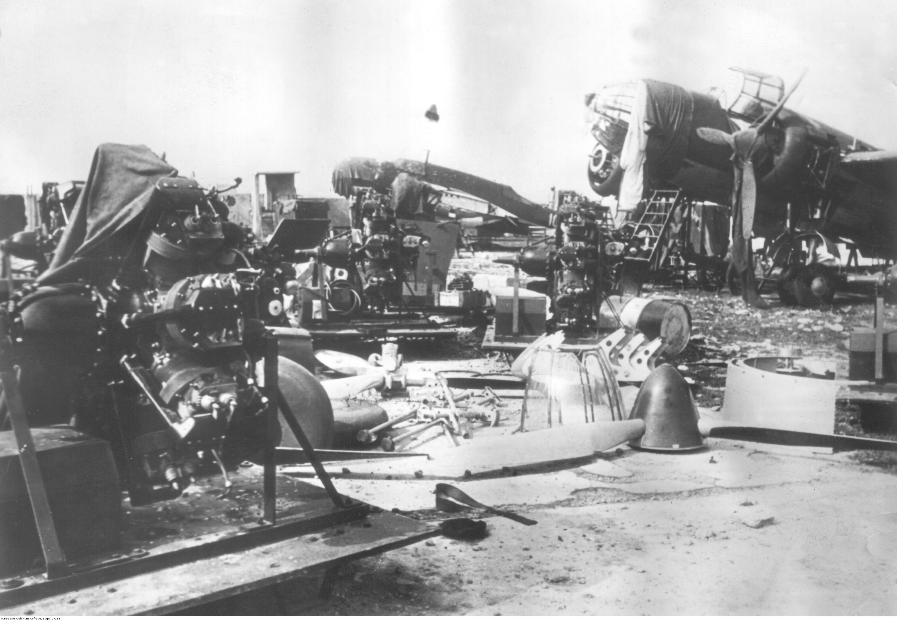 Polskie samoloty PZL.37 Łoś zdobyte przez Niemców i rozkładane na części. Na pierwszym planie widoczne silniki gwiazdowe Bristol Pegasus (PZL Pegaz).